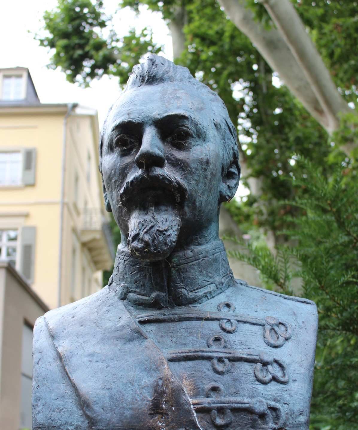 Das ist Cuza